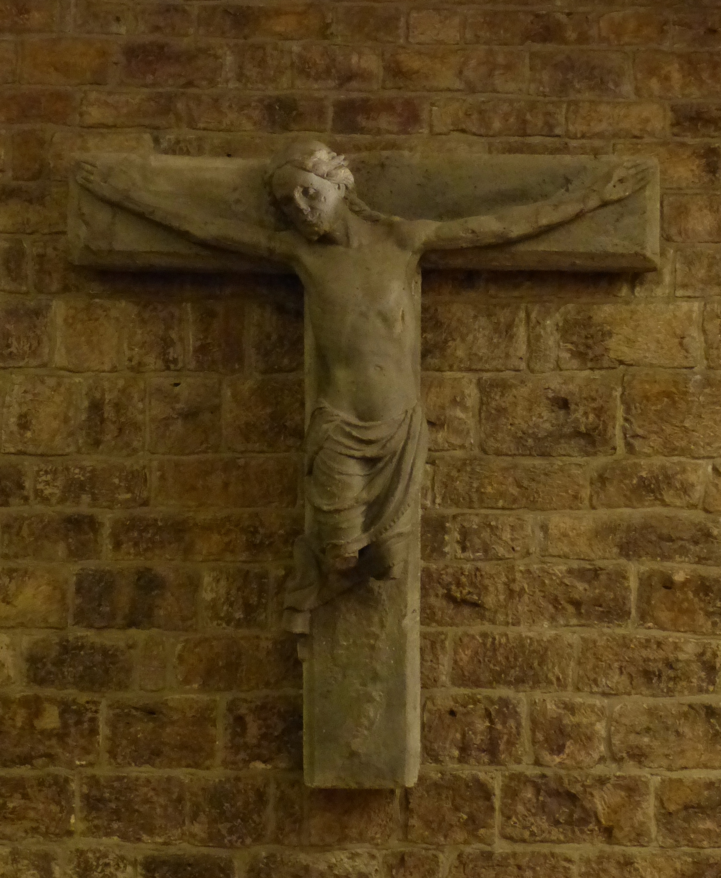 Gekreuzigter Christus, Torso der Skulptur aus der Blendarkade neben dem rechten Westportal, heute in der Ostkrypta (Raum der Stille)